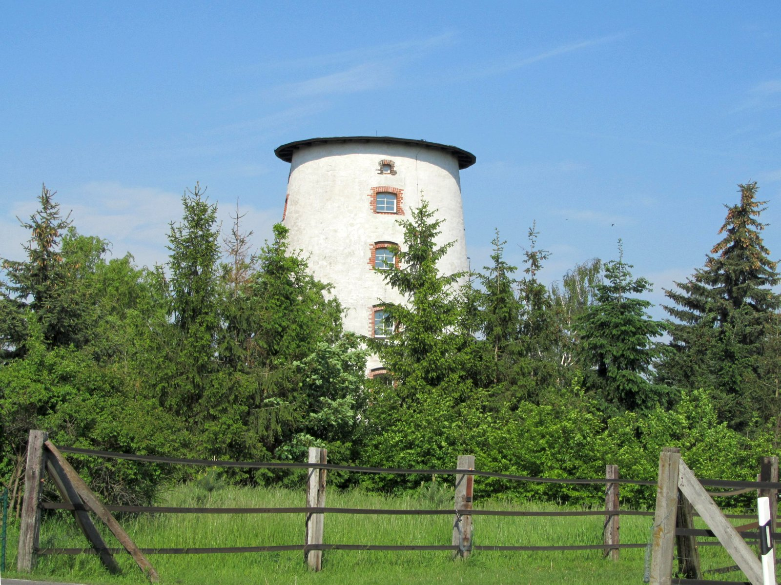 Groß Rosenburg, Windmühle